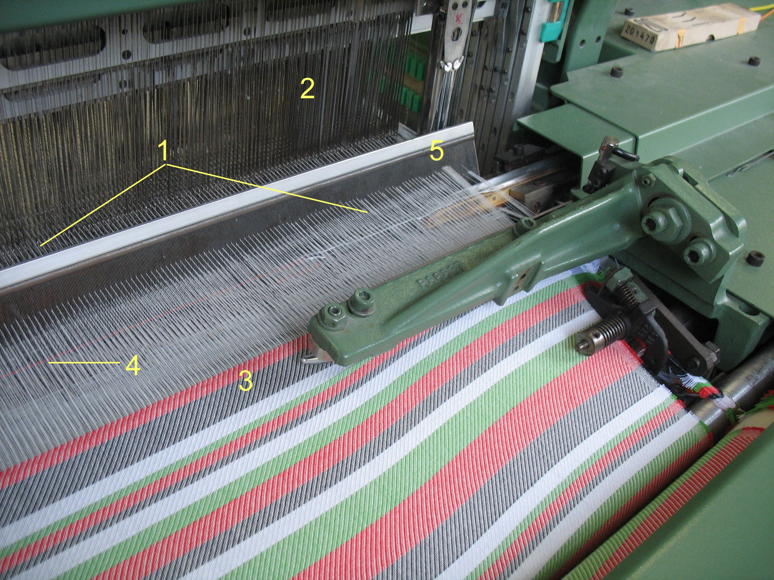 Vorderfach einer Webmaschine